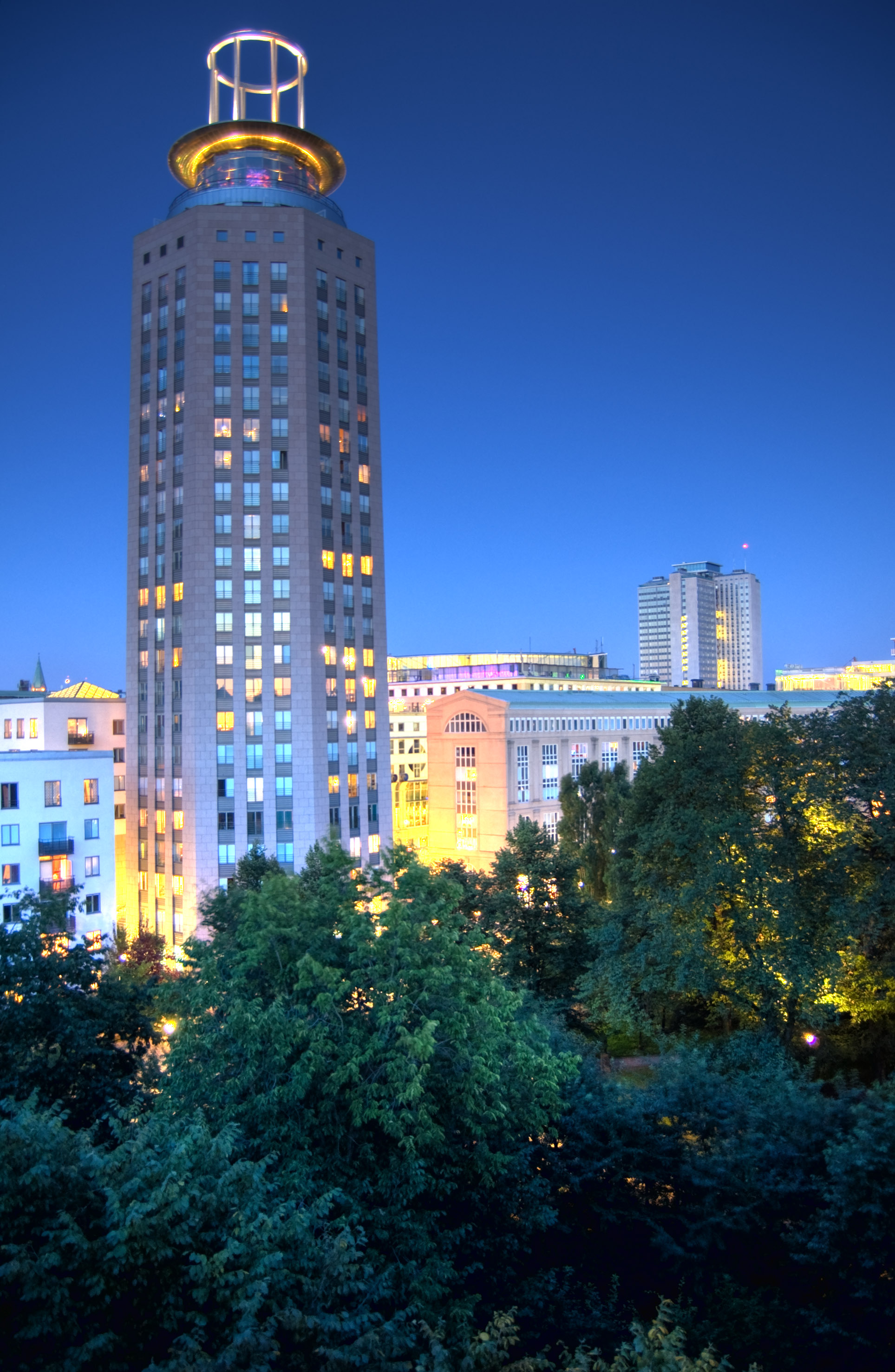 Södertornet in Stockholm, Sweden.